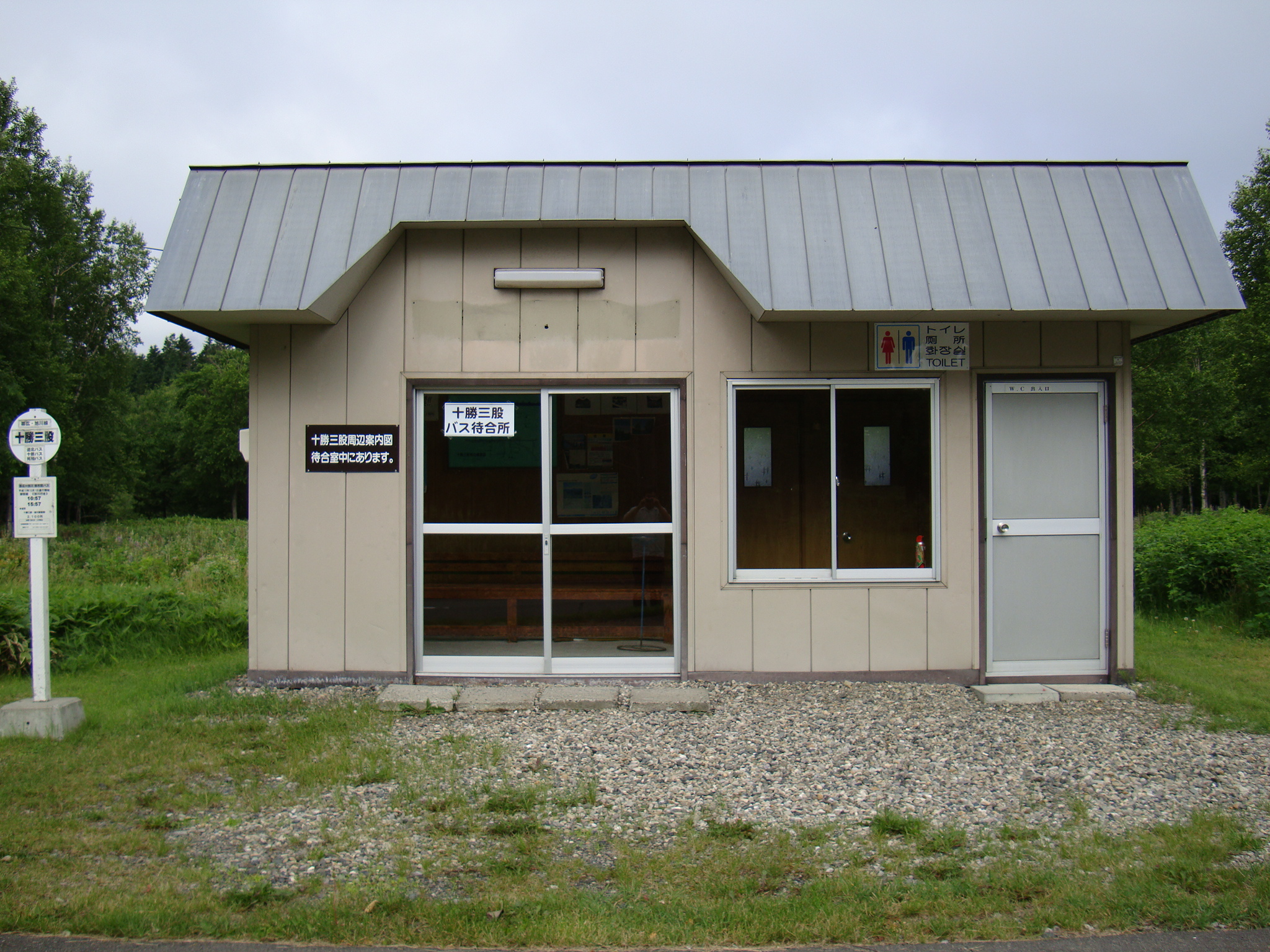 "Tokachi-Mitsumata" Bus stop